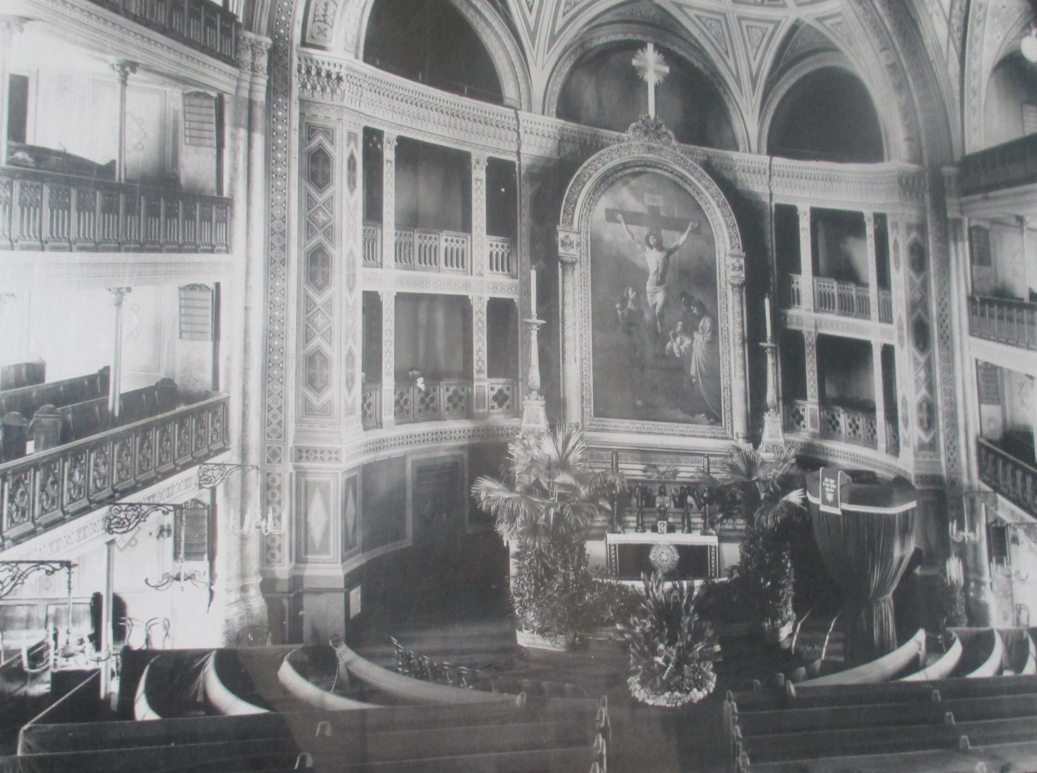 Vue intérieure de l'église luthérienne Saint-Pierre-et-Saint-Paul de Saint-Pétersbourg au début du XXe siècle.